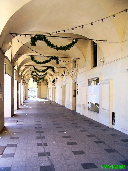 Les arcades de Garibaldi, désertes un dimanche matin après les fêtes de noel.